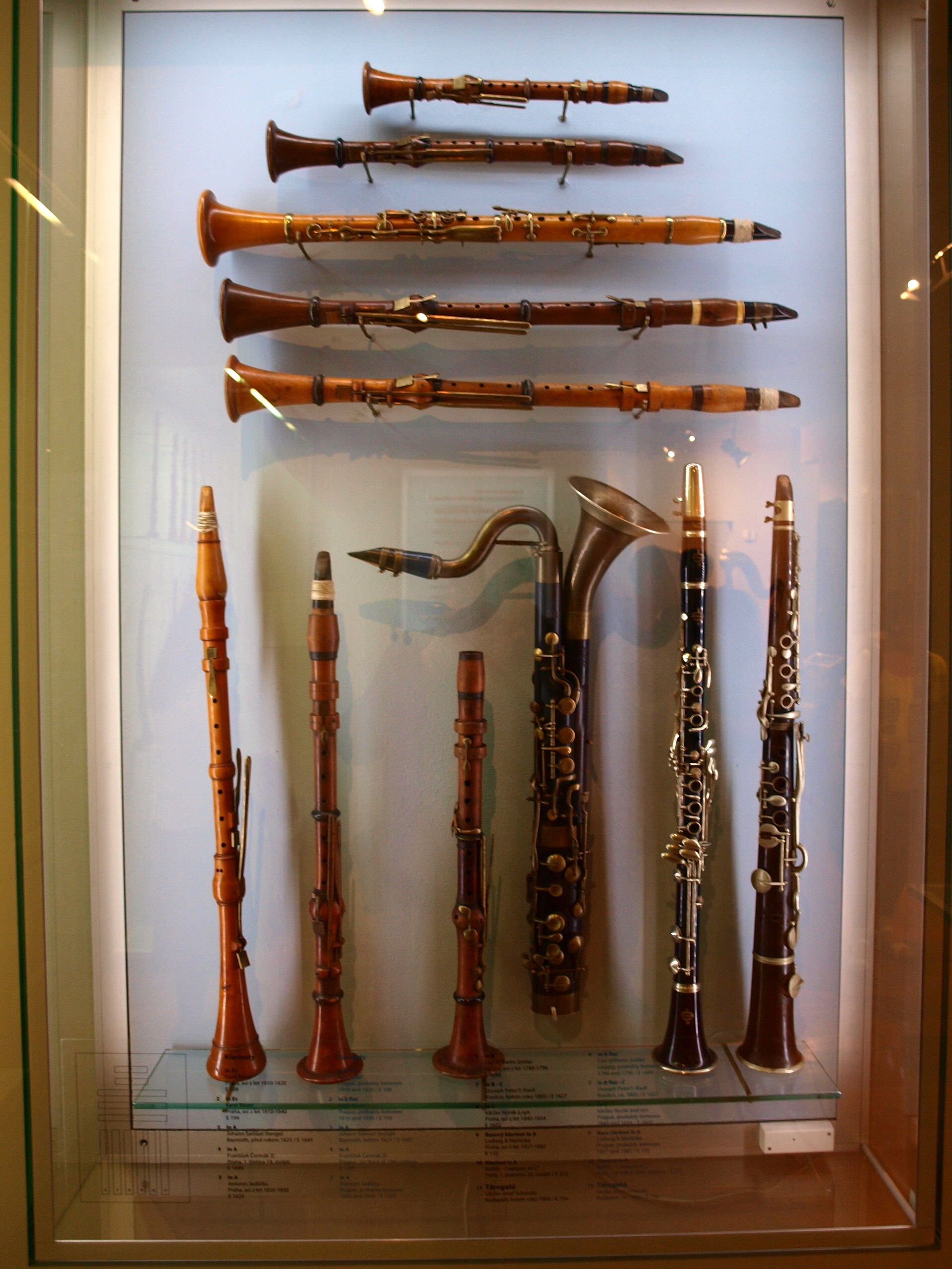 Aerofony, České muzeum hudby